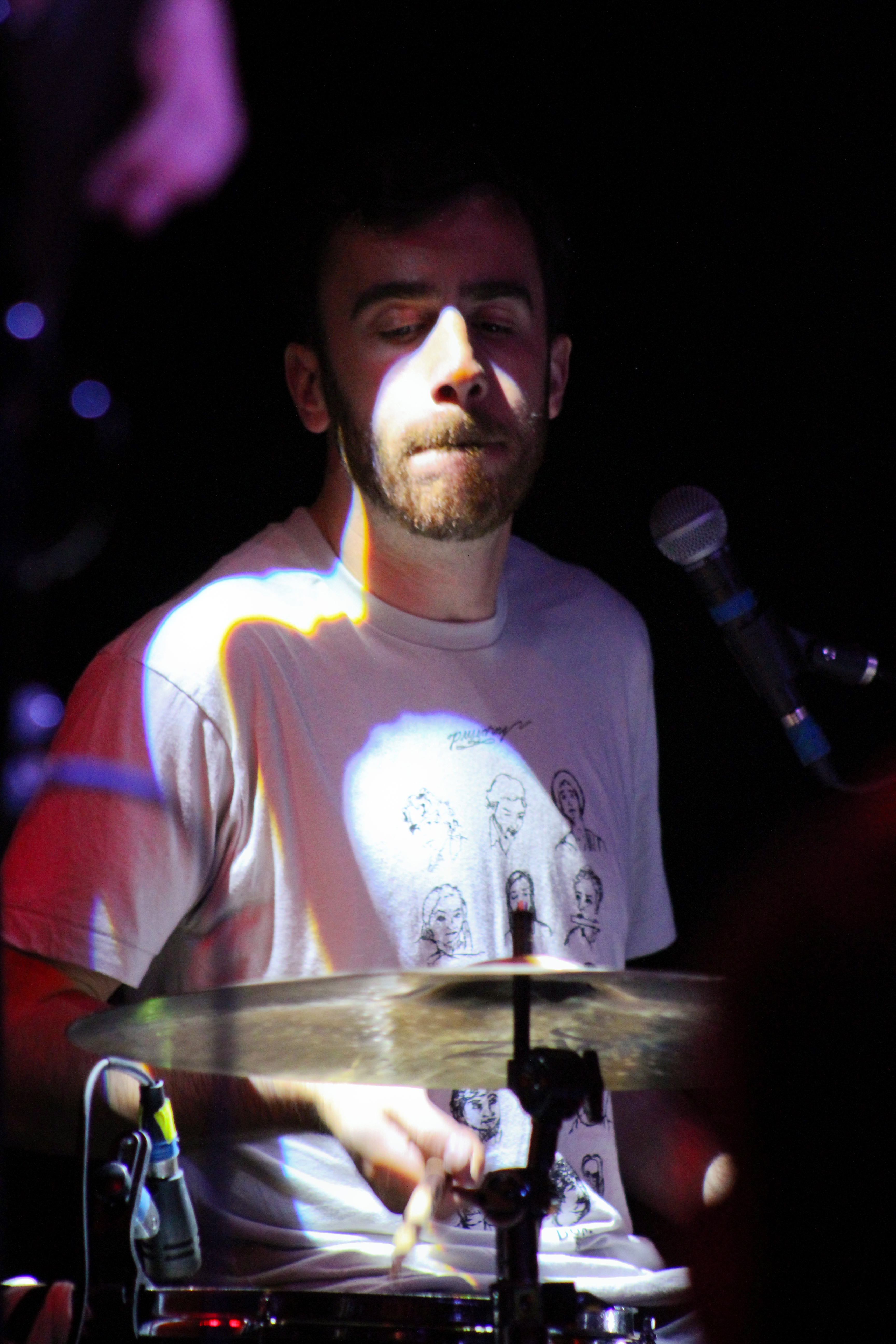 Pinegrove